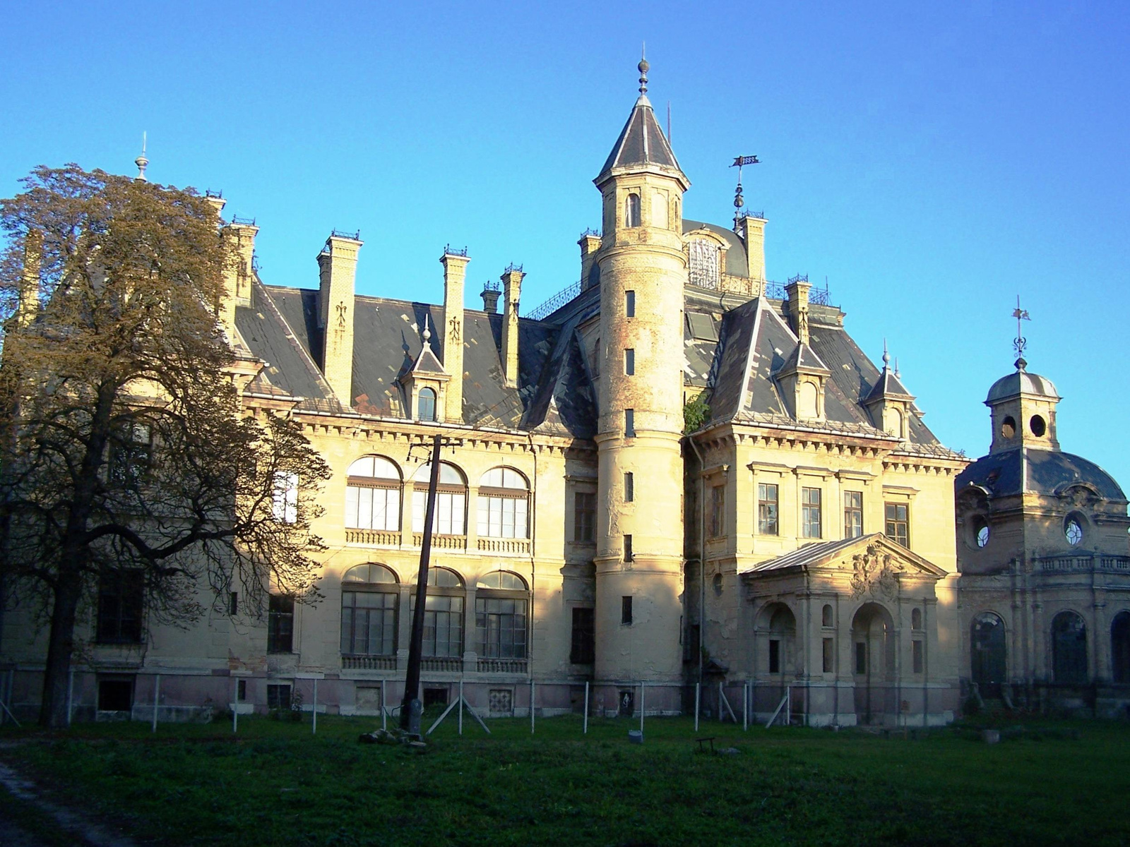 Schossberger-kastély (Tura, Kossuth u.) This is a photo of a monument in Hungary. Identifier: 7474